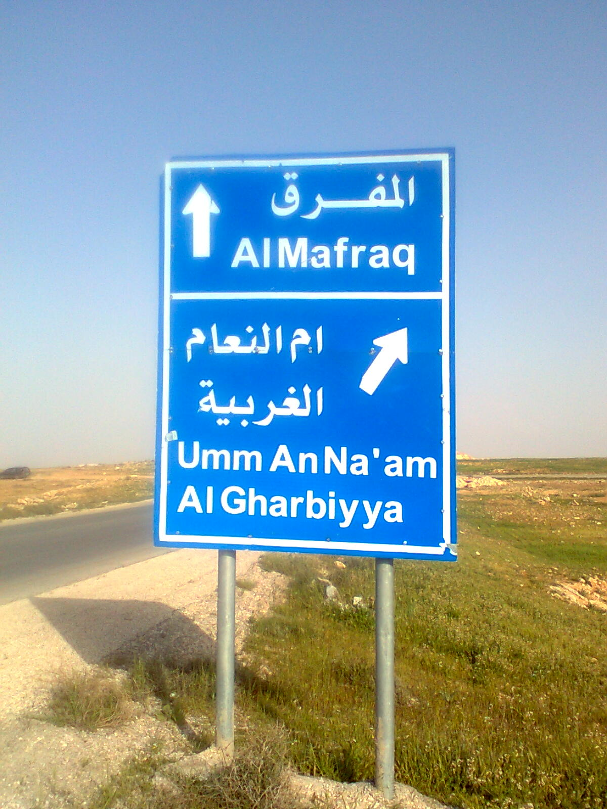 قرية أم النعام الغربية في محافظة المفرق